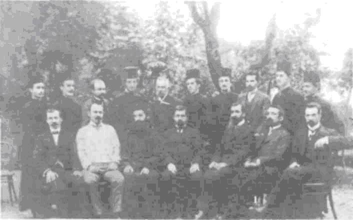 Учители и ученици от българската семинария в Цариград (1908-1909). Васил Шанов е обозначен с 1.